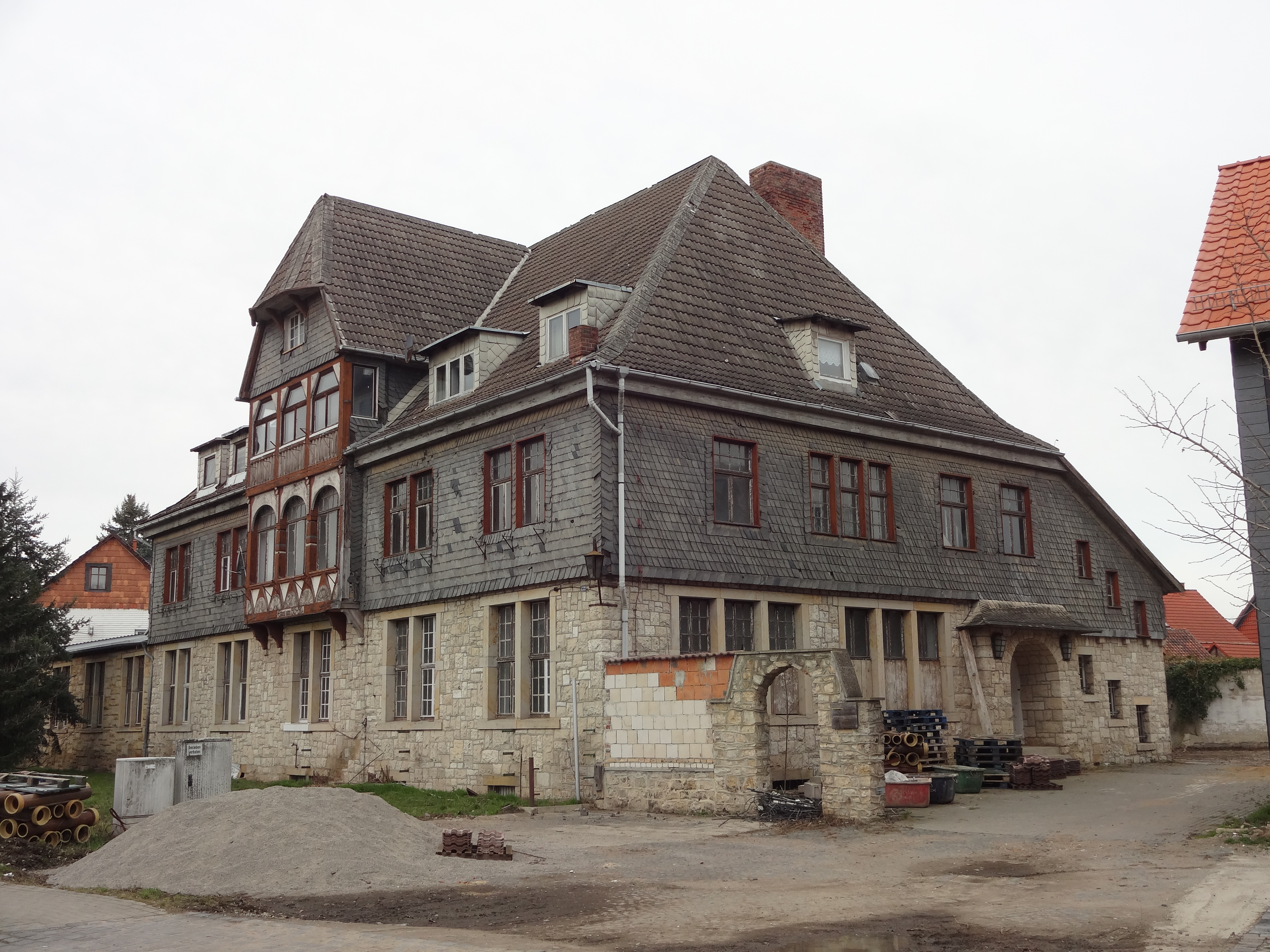 Kulturdenkmal in Derenburg